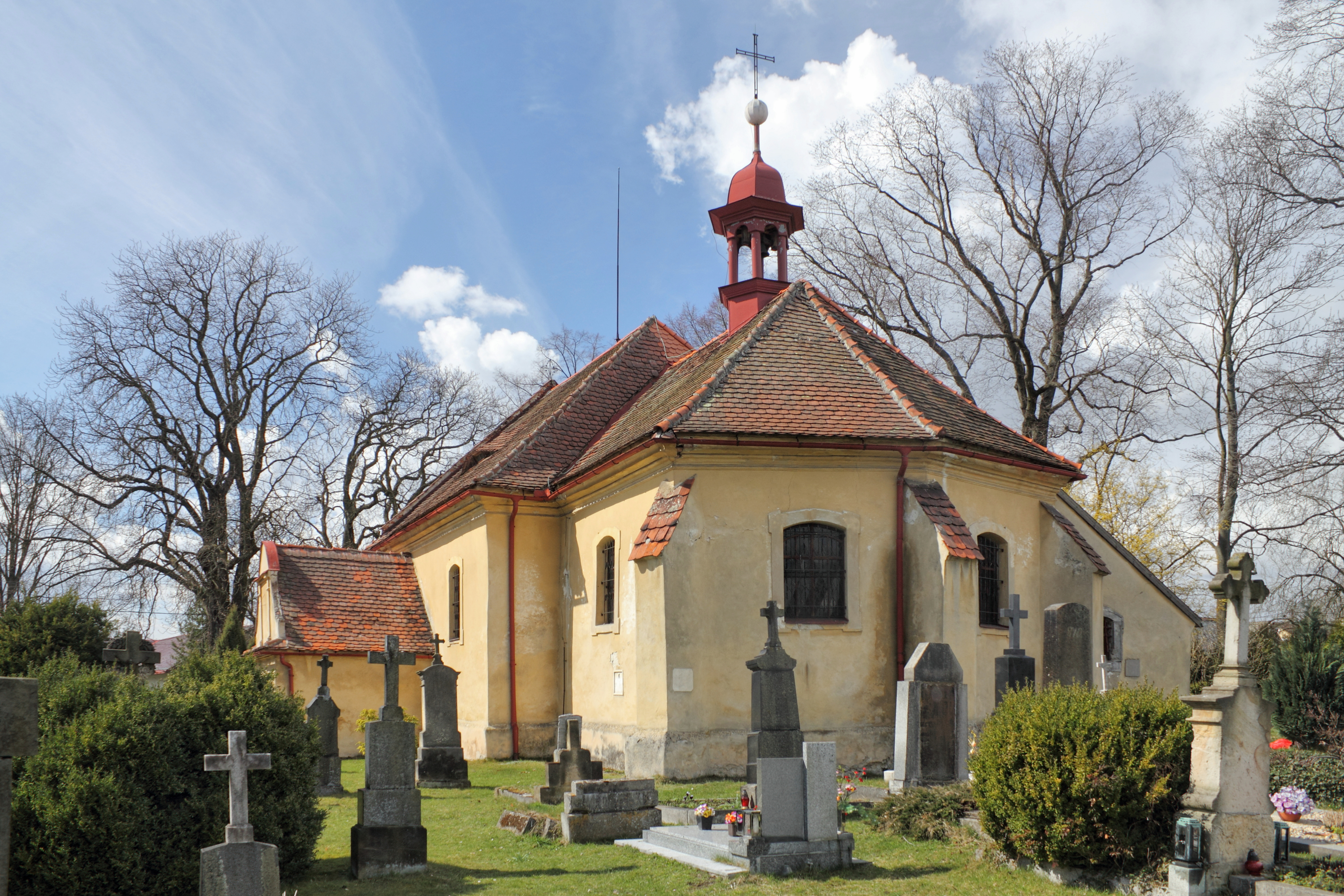 Kostel sv. Kateřiny, Vlastibořice